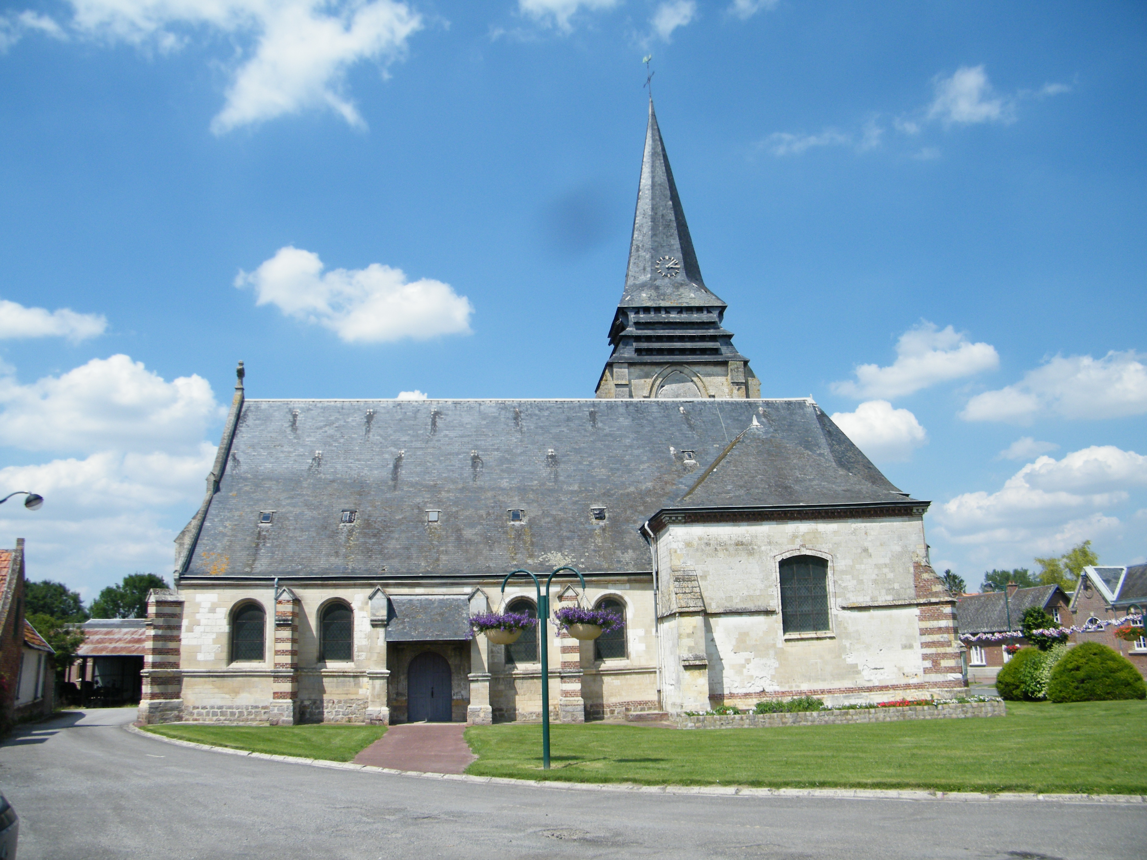 Vue de l'église Saint-Georges.